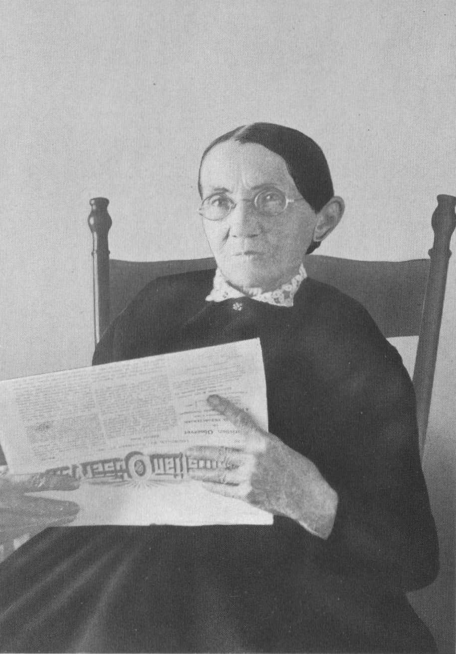 Henrietta Gauß geb. Fawcett (1817–1909), Ehefrau von Eugen Gauß.